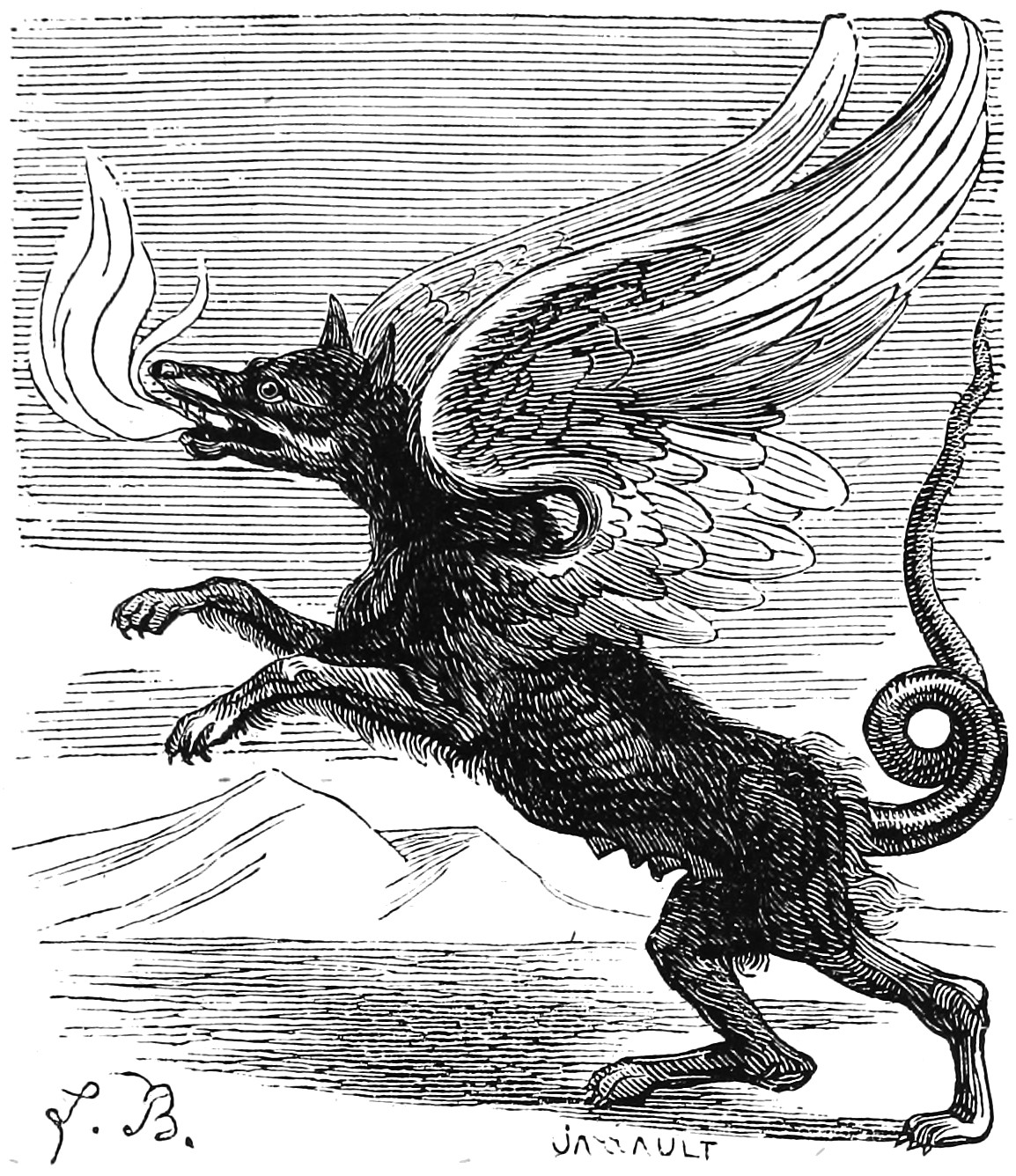 Illustration du Dictionnaire infernal de Jacques Auguste Simon Collin de Plancy par Louis Le Breton, 6eme édition, 1863.